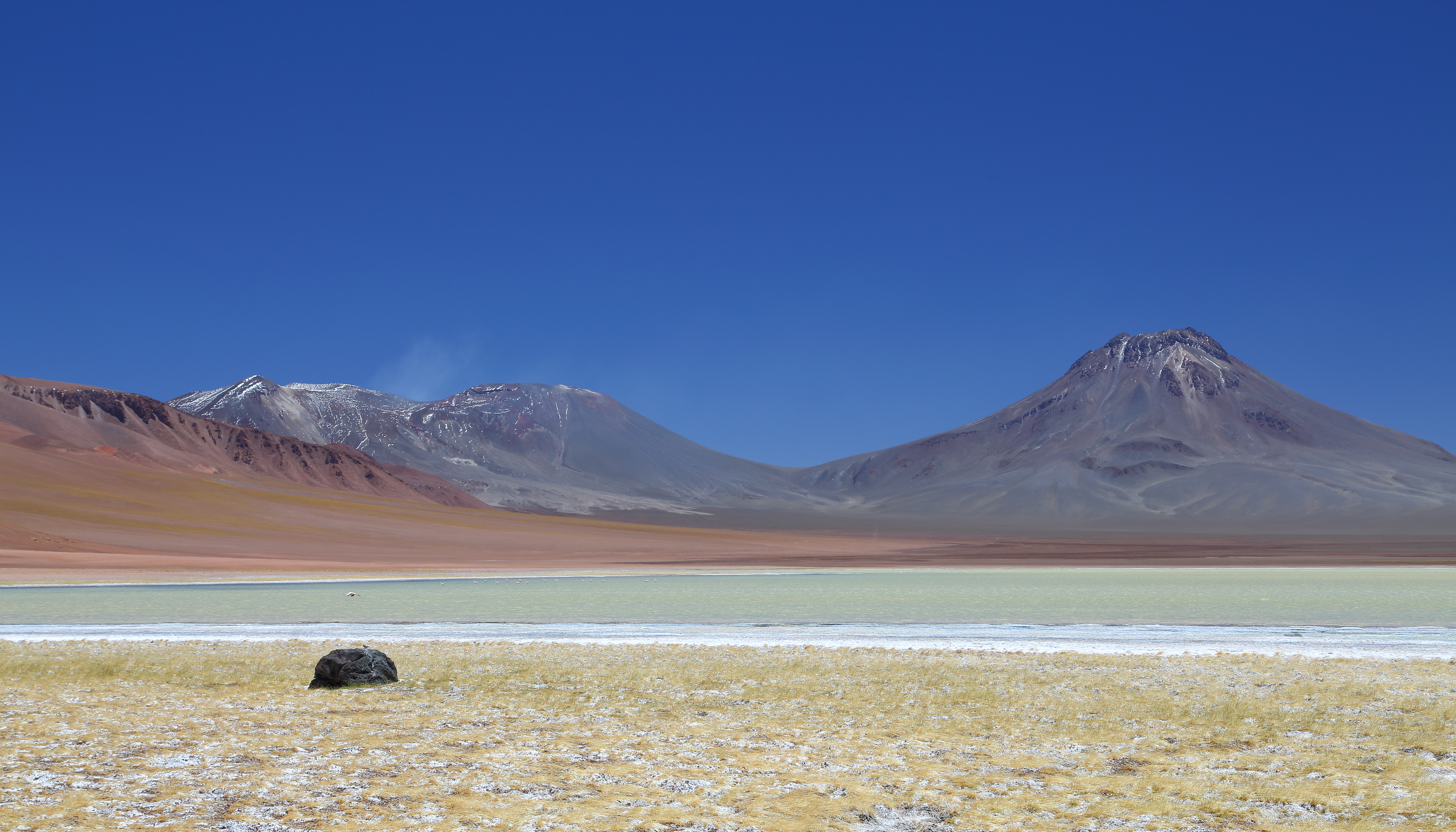 Volcanos Lascar (izq.) y Águas Calientes (der.)